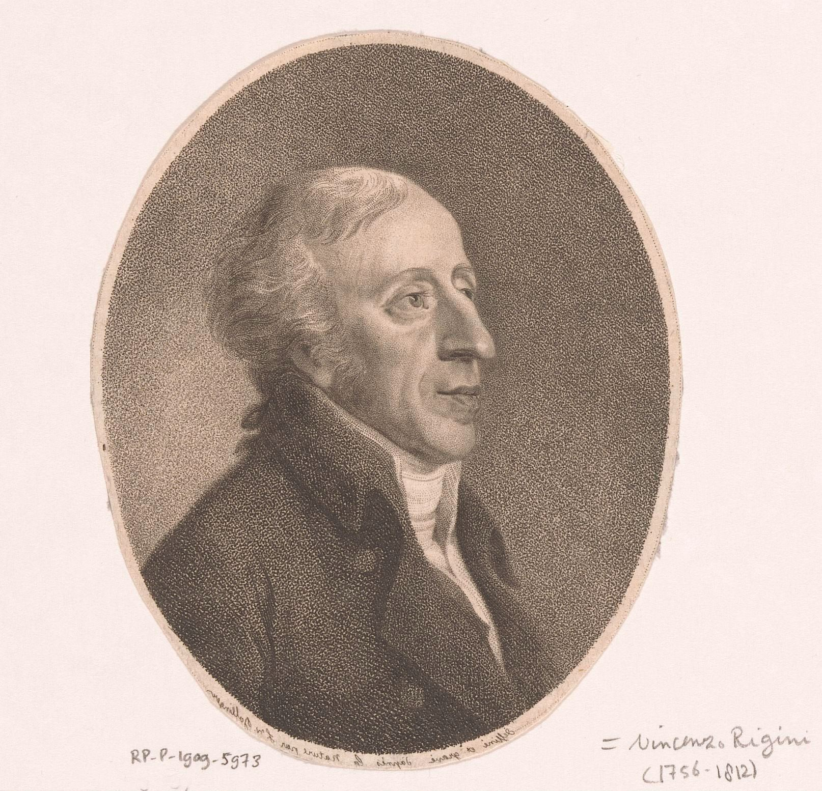 IdentificatieTitel(s): Portret van Vincenzo RiginiObjecttype: prent Objectnummer: RP-P-1909-5973Opschriften / Merken: verzamelaarsmerk, verso, gestempeld: Lugt 2228VervaardigingVervaardiger: prentmaker: Friedrich Wilhelm Bollinger (vermeld op object)naar eigen ontwerp van: Friedrich Wilhelm Bollinger (vermeld op object)Plaats vervaardiging: BerlijnDatering: 1803Materiaal: papier Techniek: stippelwerkAfmetingen: blad: h 114 mm × b 92 mmToelichtingHet onderschrift in spiegelbeeld: 'dessiné et gravé d'apres la nature par F.W. Bollinger'.OnderwerpWat: historical personsWie: Vincenzo RighiniVerwerving en rechtenVerwerving: aankoop 1905Copyright: Publiek domein